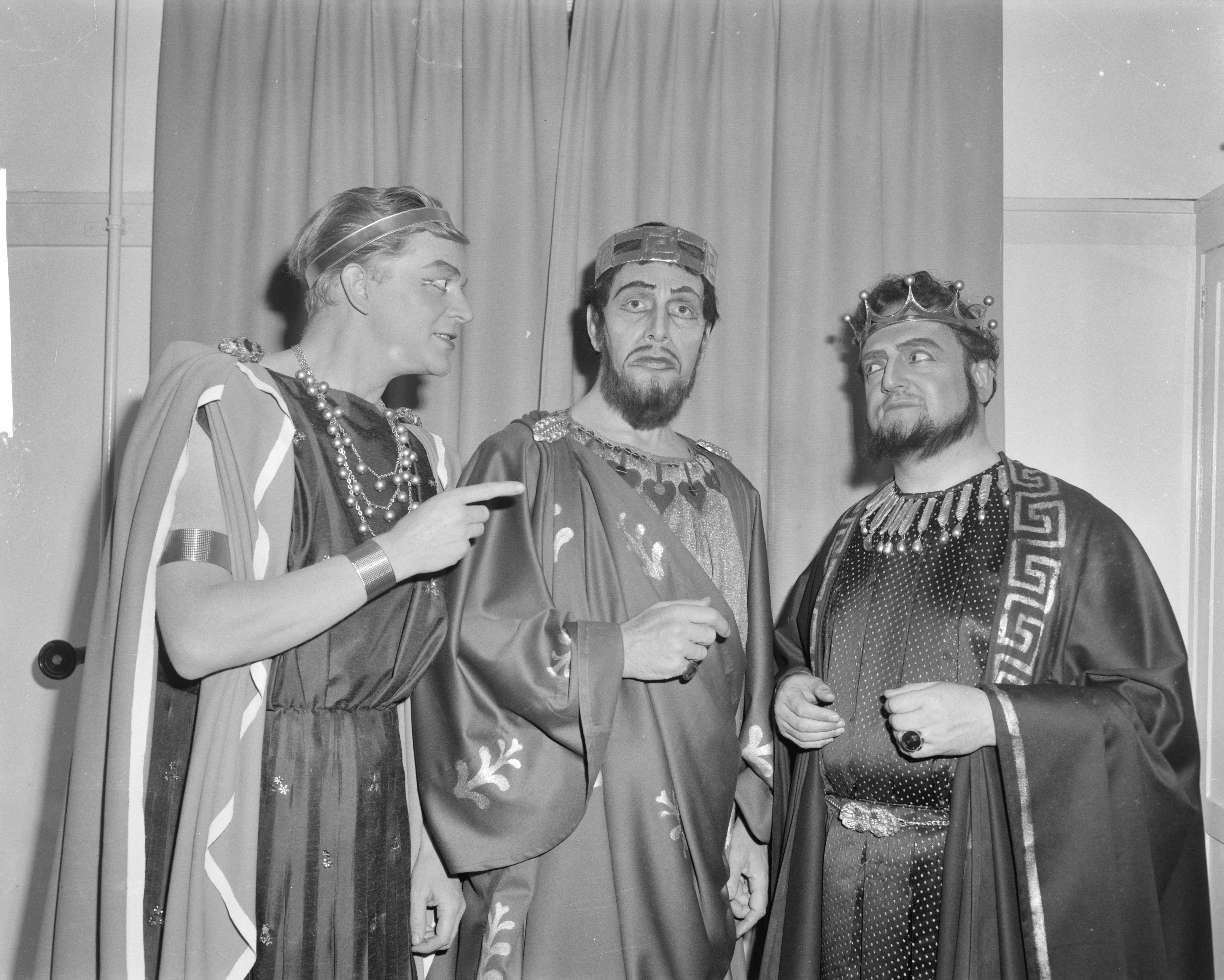 Collectie / Archief : Fotocollectie Anefo Reportage / Serie : [ onbekend ] Beschrijving : Holland Festival (Uitvoering door de Nederlandse Opera van " Ã l ritorno d'Ulysse in patria" van Claudio Montiverdi), Arian Blanken, George Littary , Justus Bon Datum : 14 juni 1962 Locatie : Amsterdam, Noord-Holland Trefwoorden : festivals, muziek, opera Persoonsnaam : Blanken Arian, Bon Justus, Littary George Fotograaf : Bilsen, Joop van / Anefo Auteursrechthebbende : Nationaal Archief Materiaalsoort : Negatief (zwart/wit) Nummer archiefinventaris : bekijk toegang 2.24.01.04 Bestanddeelnummer : 914-0238